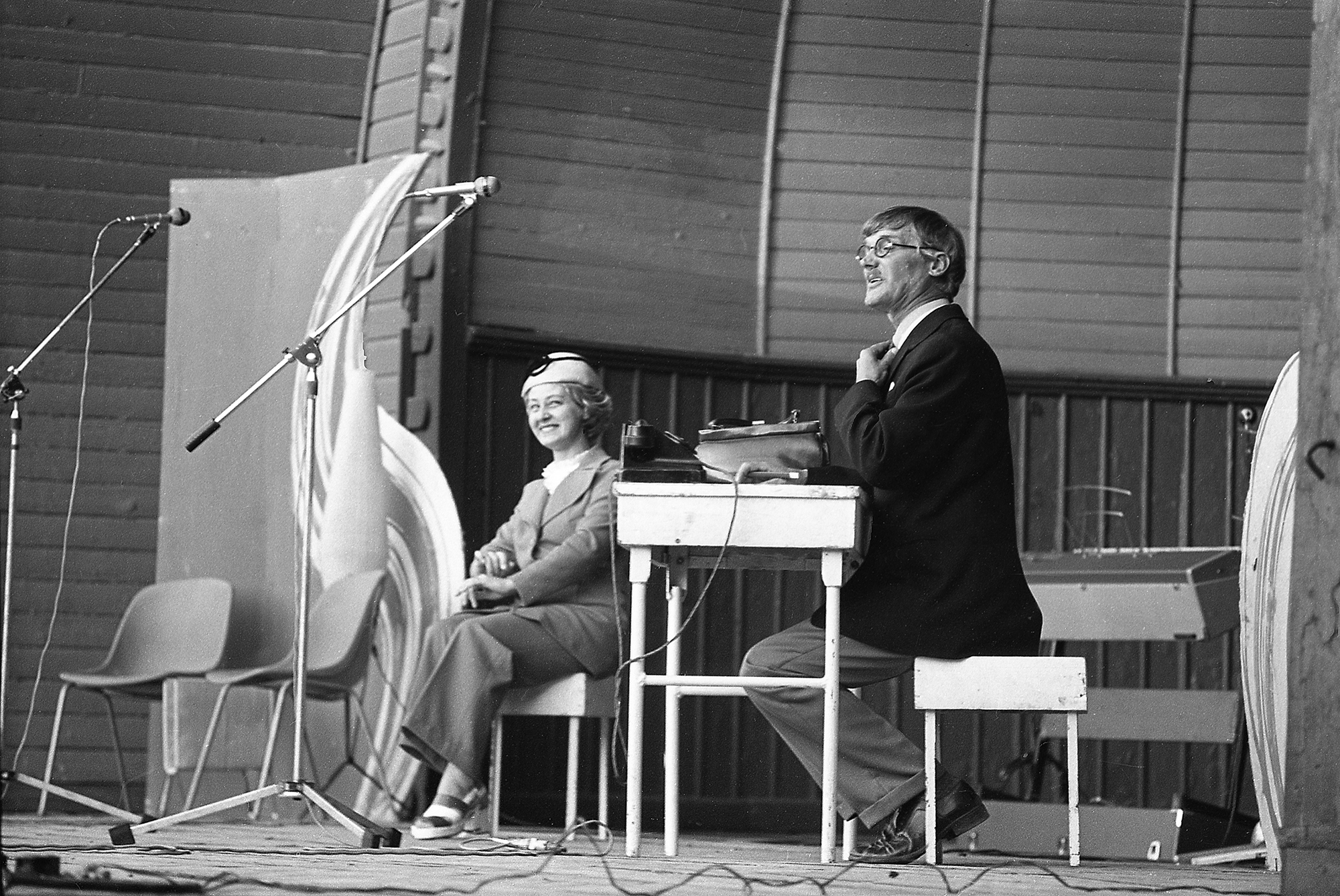 Ervin Abel Kadrioru kõlakojas 74